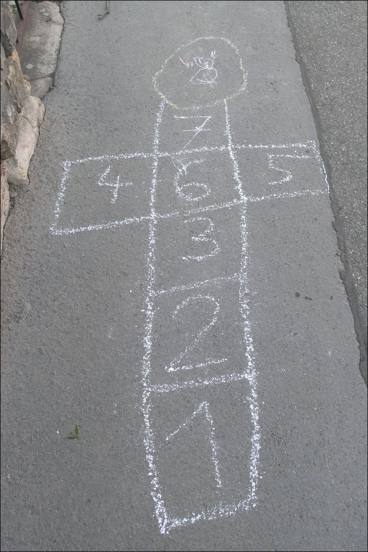 Nebe, peklo, ráj / hopscotch